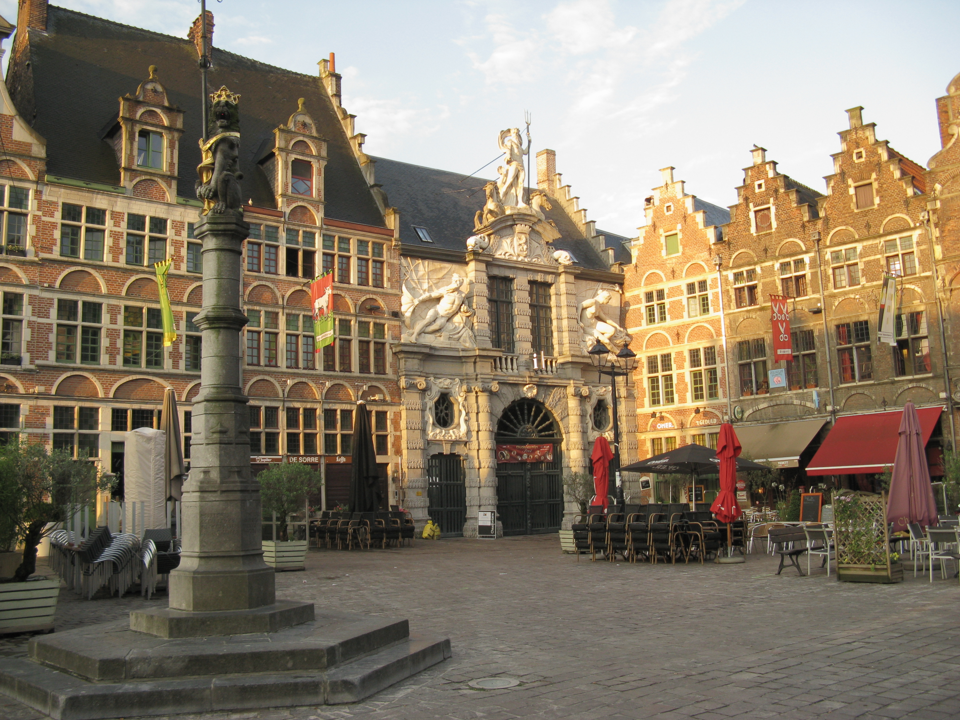 Sint-Veerleplein, Gent